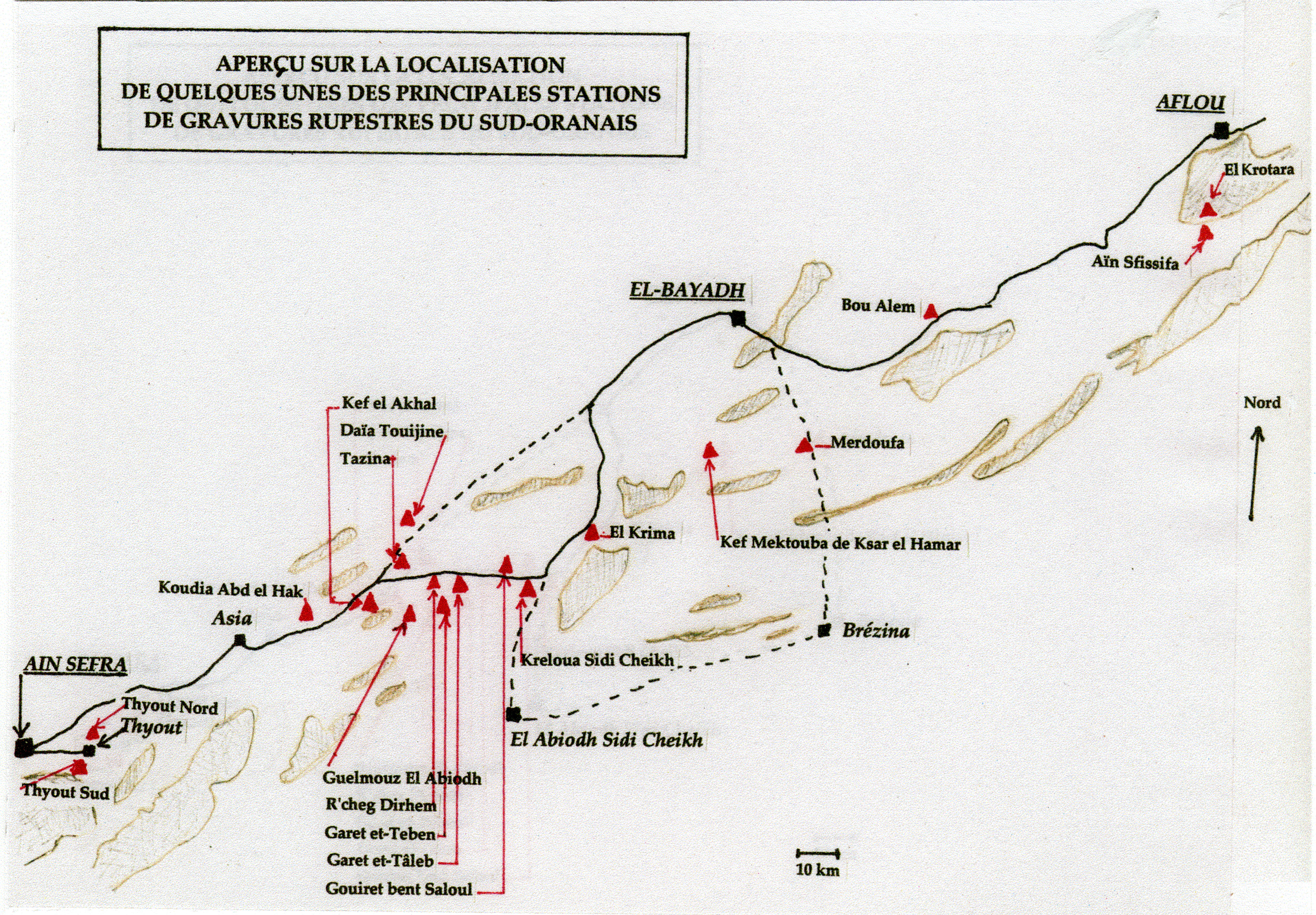 Aperçu sur la localisation de quelques unes des gravures préhistoriques les plus importantes du Sud-oranais (Algérie)